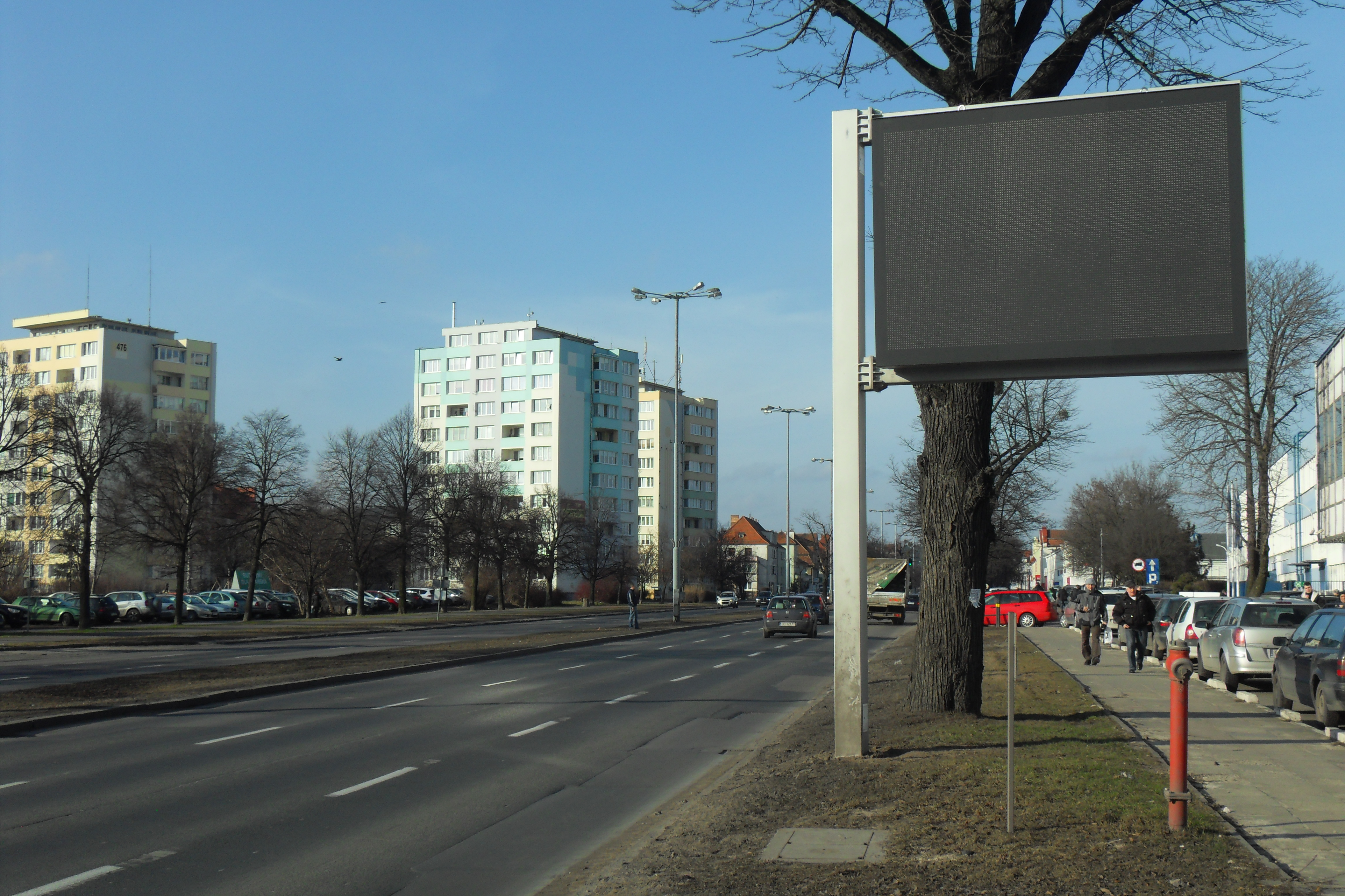 Gdańsk Oliwa, al. Grunwaldzka, elektroniczna tablica (o zmiennej treści) systemu Tristar.